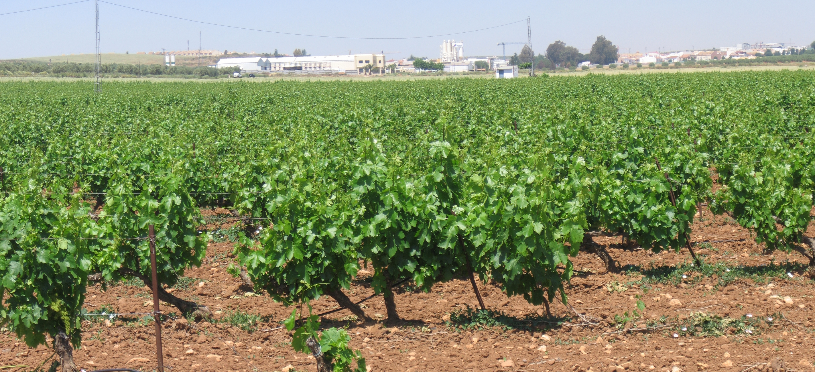 Mollina